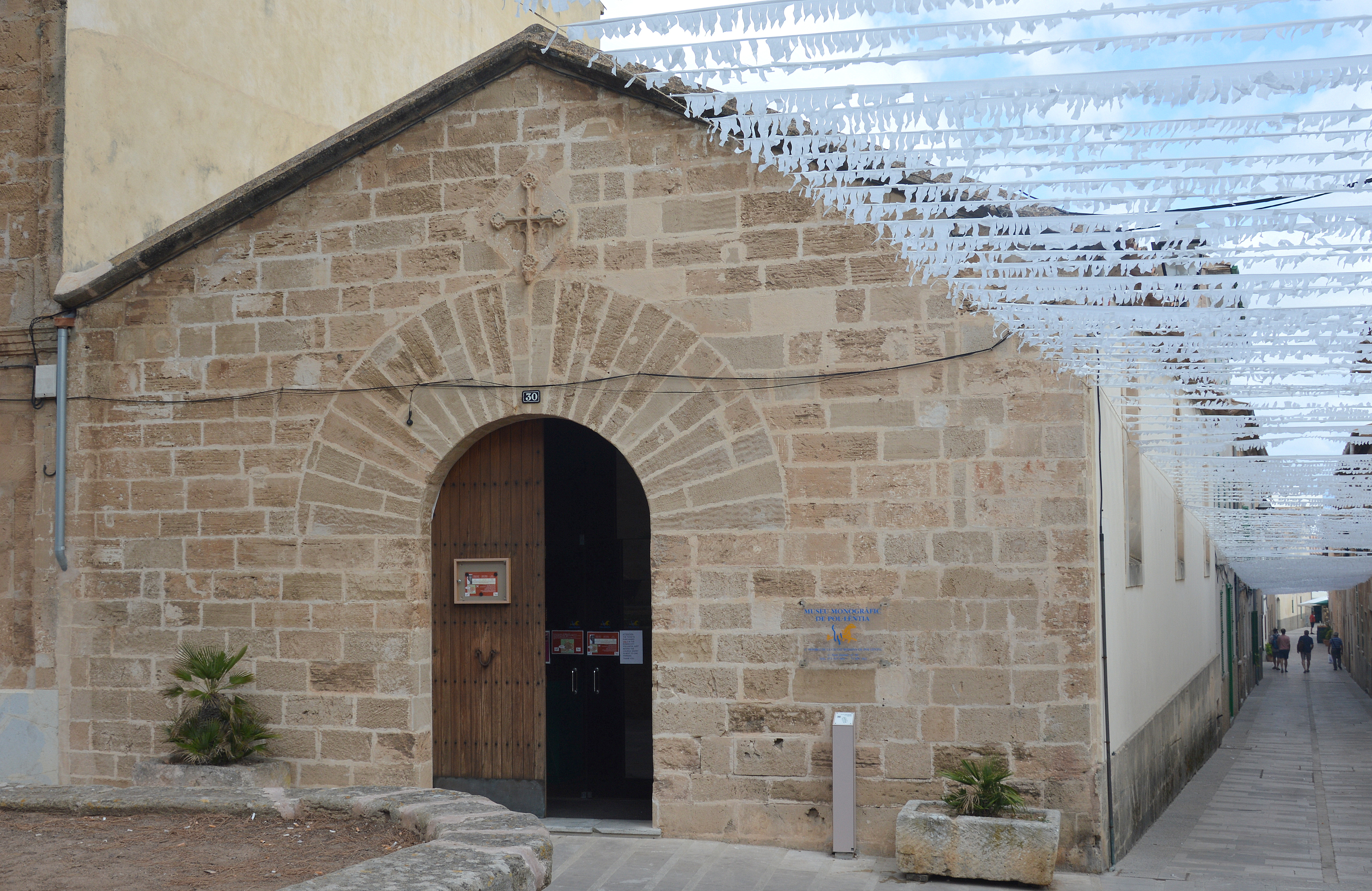 Monografisches Museum Pollentia Alcudia